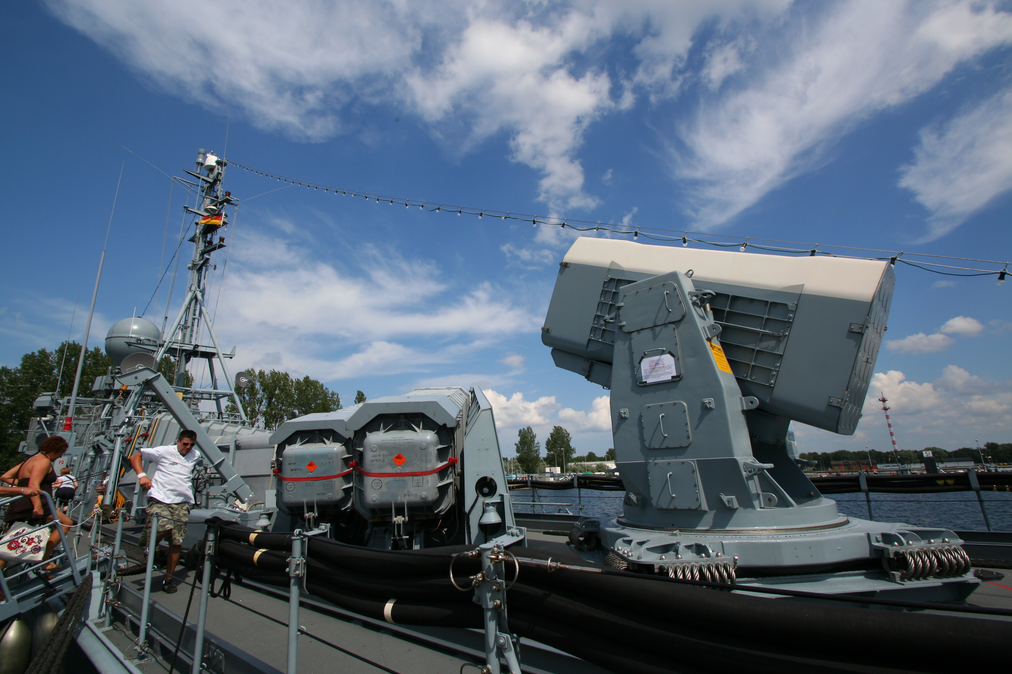 Hanse Sail 2009 - Schnellboote der Gepard-Klasse..